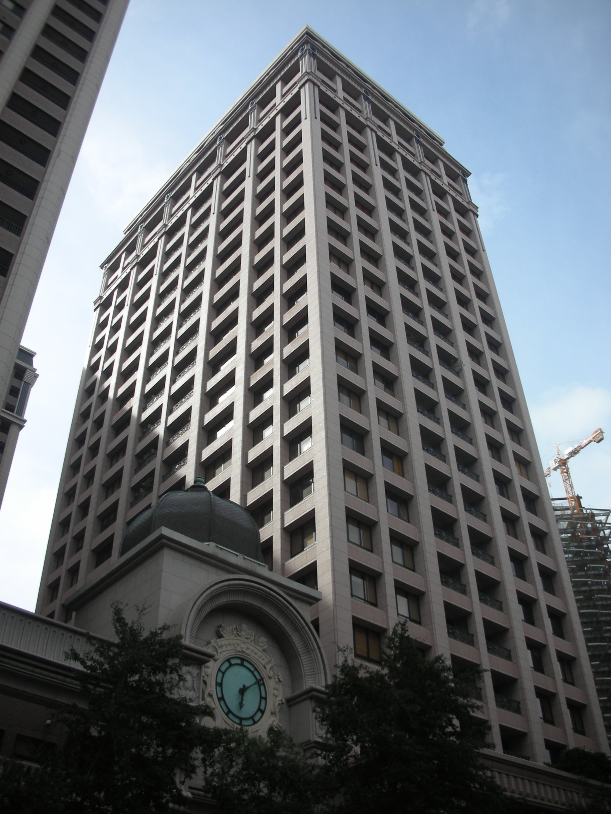 中悅環球企業總部為桃園市桃園區的高層住宅建築，高117.3公尺。